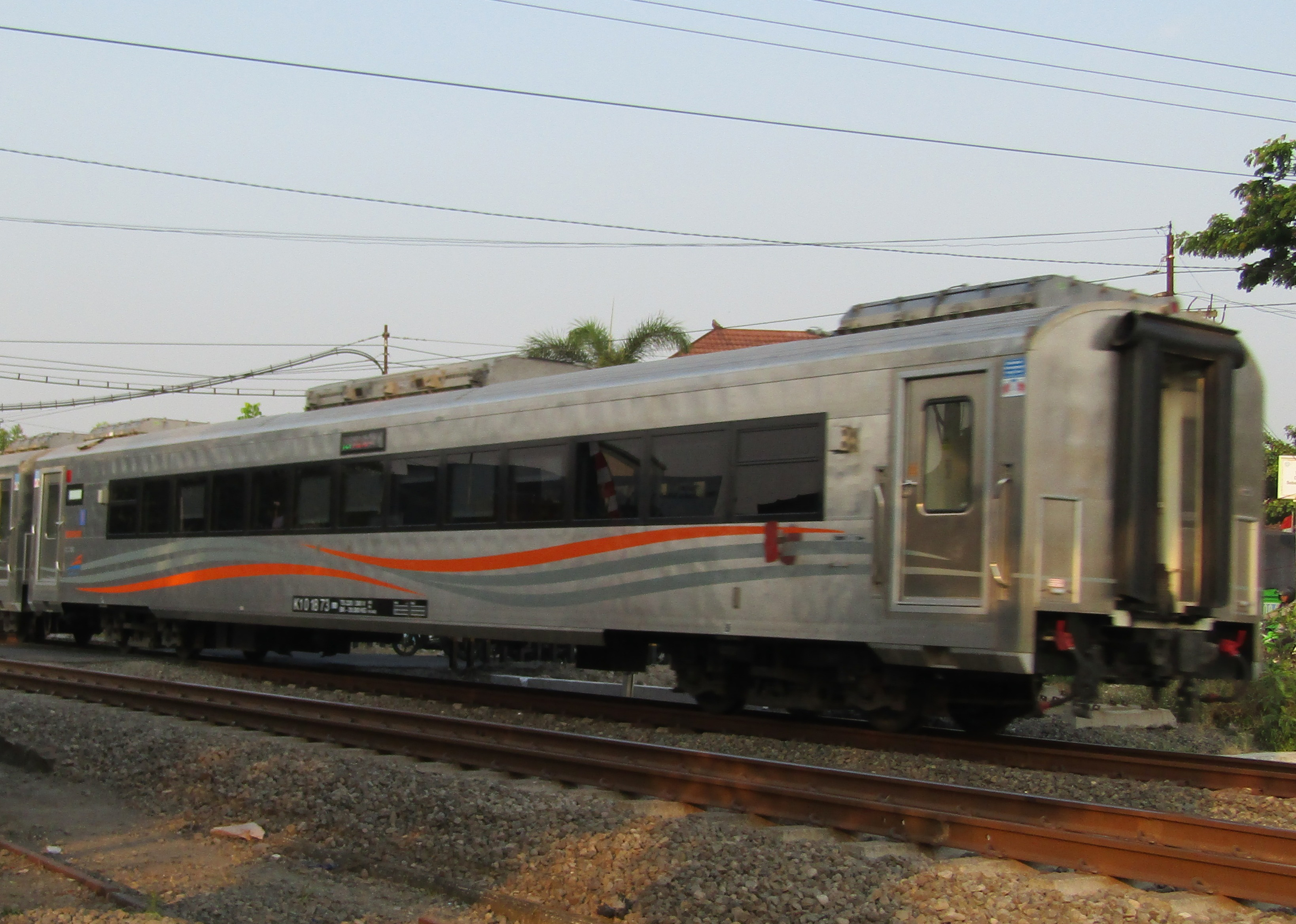 Eksterior kereta eksekutif stainless steel produksi PT Inka Madiun